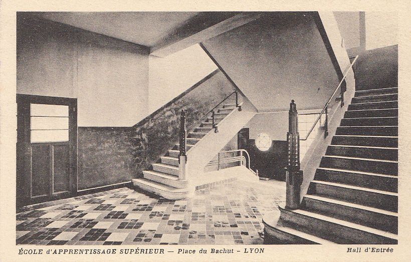 Ecole d'apprentissage supérieur - Place du Bachut - LYON Hall d'entrée